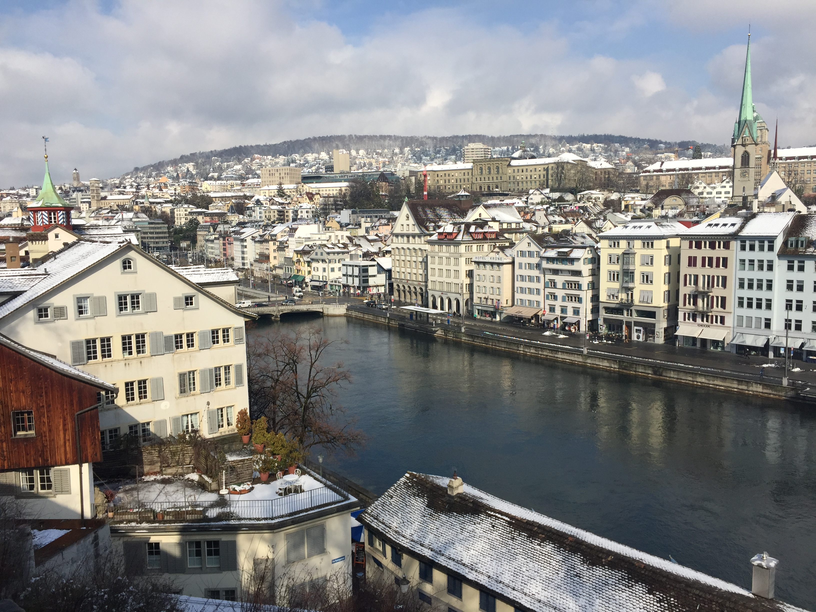 Winter in Zürich - Blick vom Lindenhof